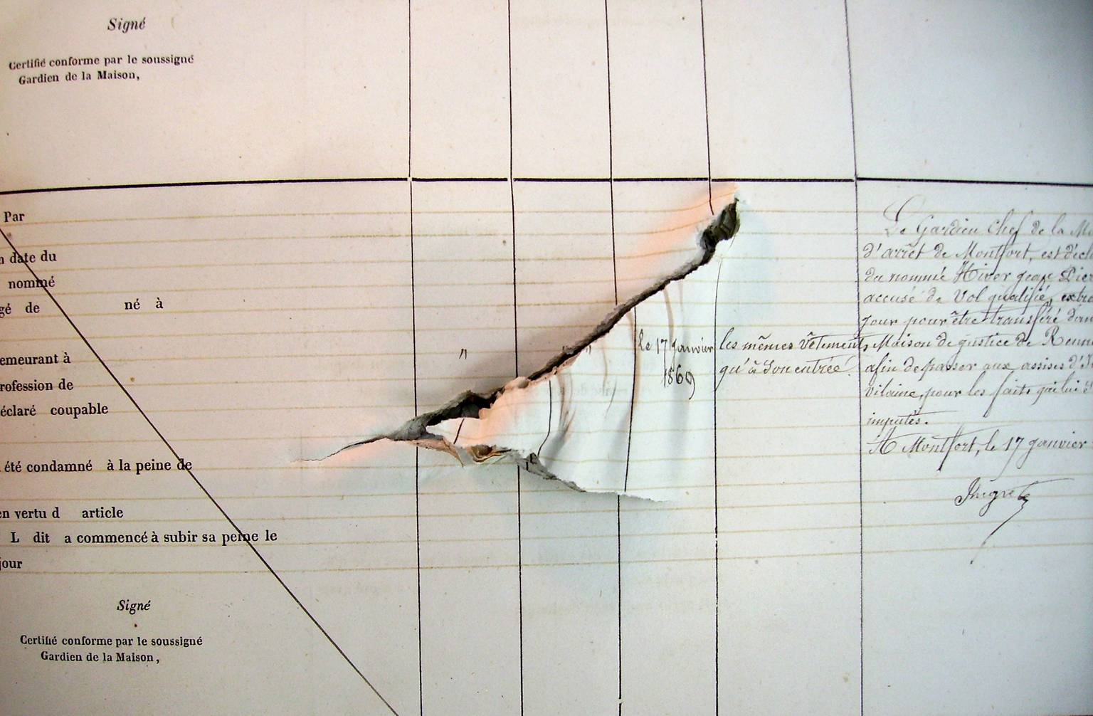 Registre d'écrou des prisons de Montfort-sur-Meu (1859-1869) endommagé lors d'un bombardement de Rennes en 1944. Archives départementales d'Ille-et-Vilaine, cote 3 Y 11. Le registre a été perforé par ses dernières pages et comme il se trouve que le registre précédent est manquant et est le seul, il est très probable que celui-ci a été bien davantage endommagé par le même éclat et a été ultérieurement éliminé.